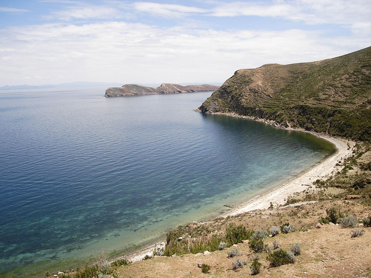 Foto tirada por mim, na Isla del Sol.